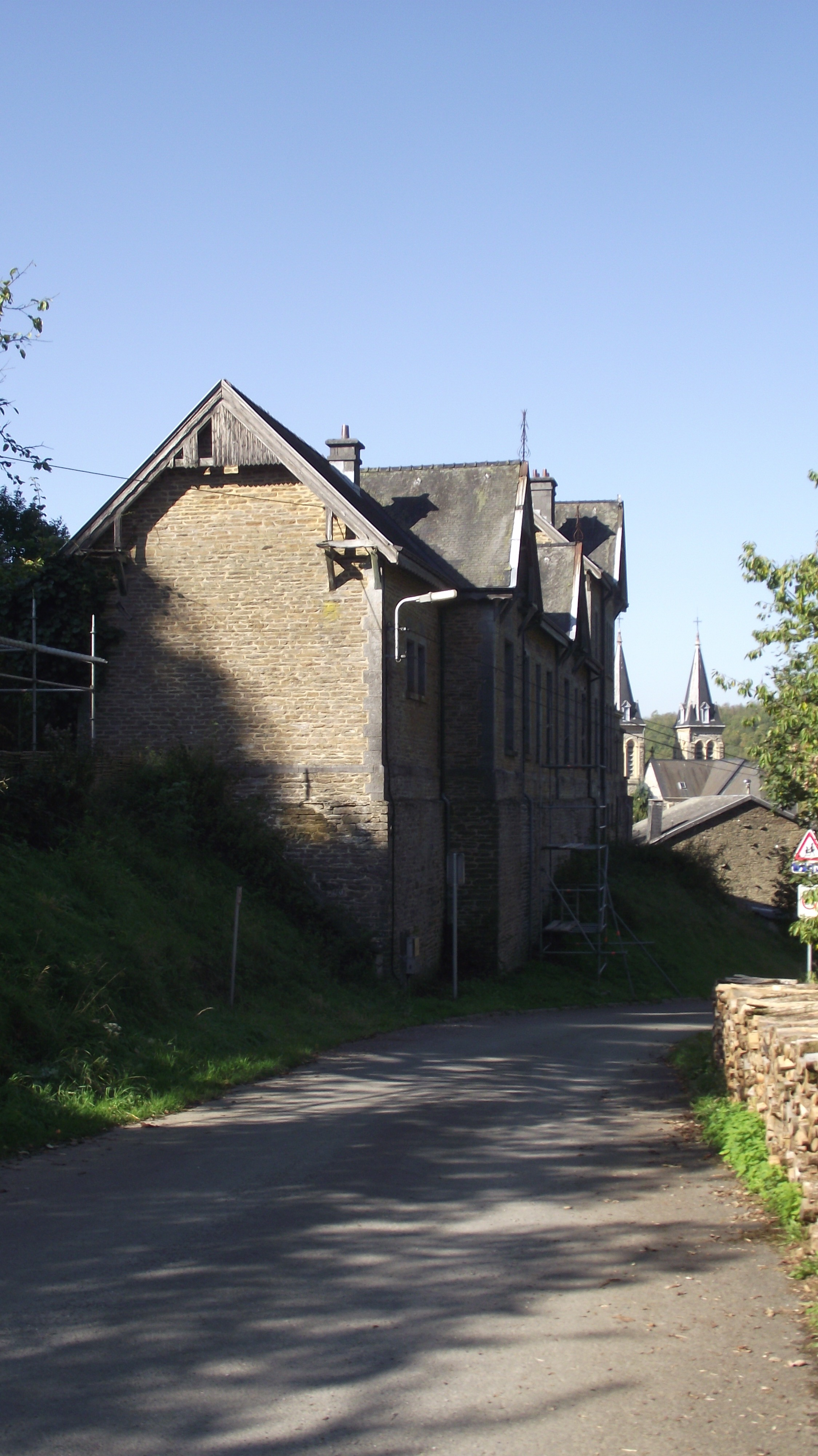 Buurtspoorwegstation in Pussemange. Is een vrij groot gebouw, omdat er hier grensverkeer was en douanekantoren nodig waren. Het spoorplatform was links.